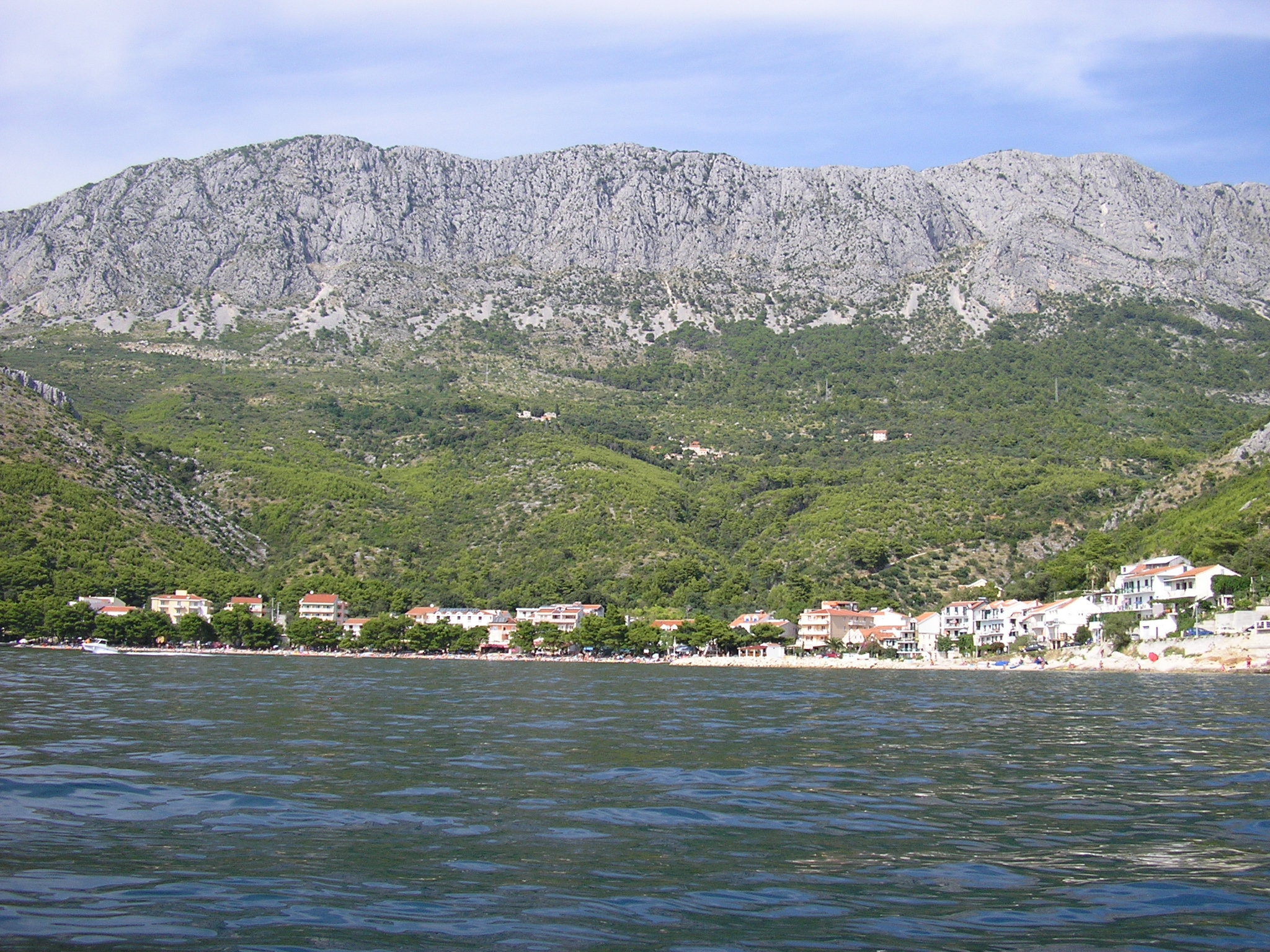 Drvenik-Gornja Vala-Biokovo